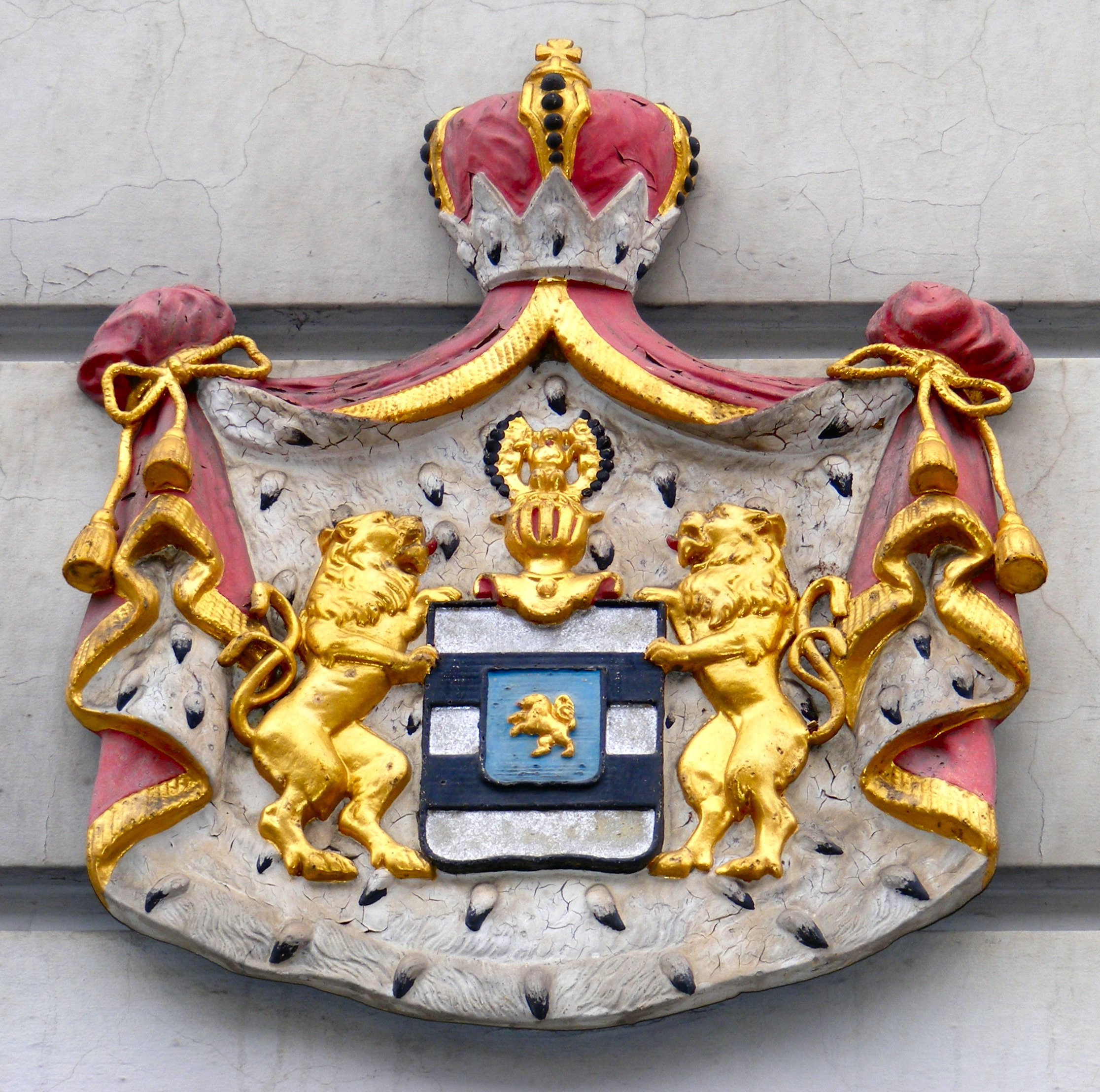 Fulda - Wappen am Anwesen Friedrichstraße 13 links vom Eingang.